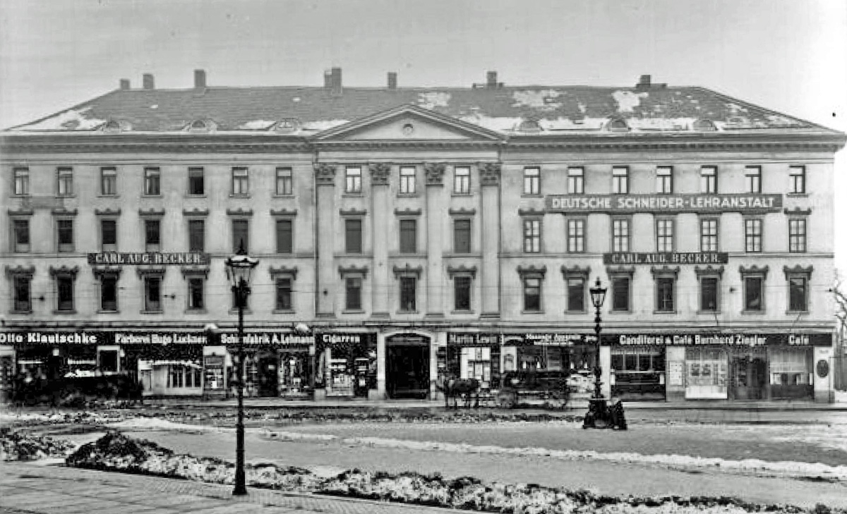 Der Große Blumenberg in Leipzig um 1915